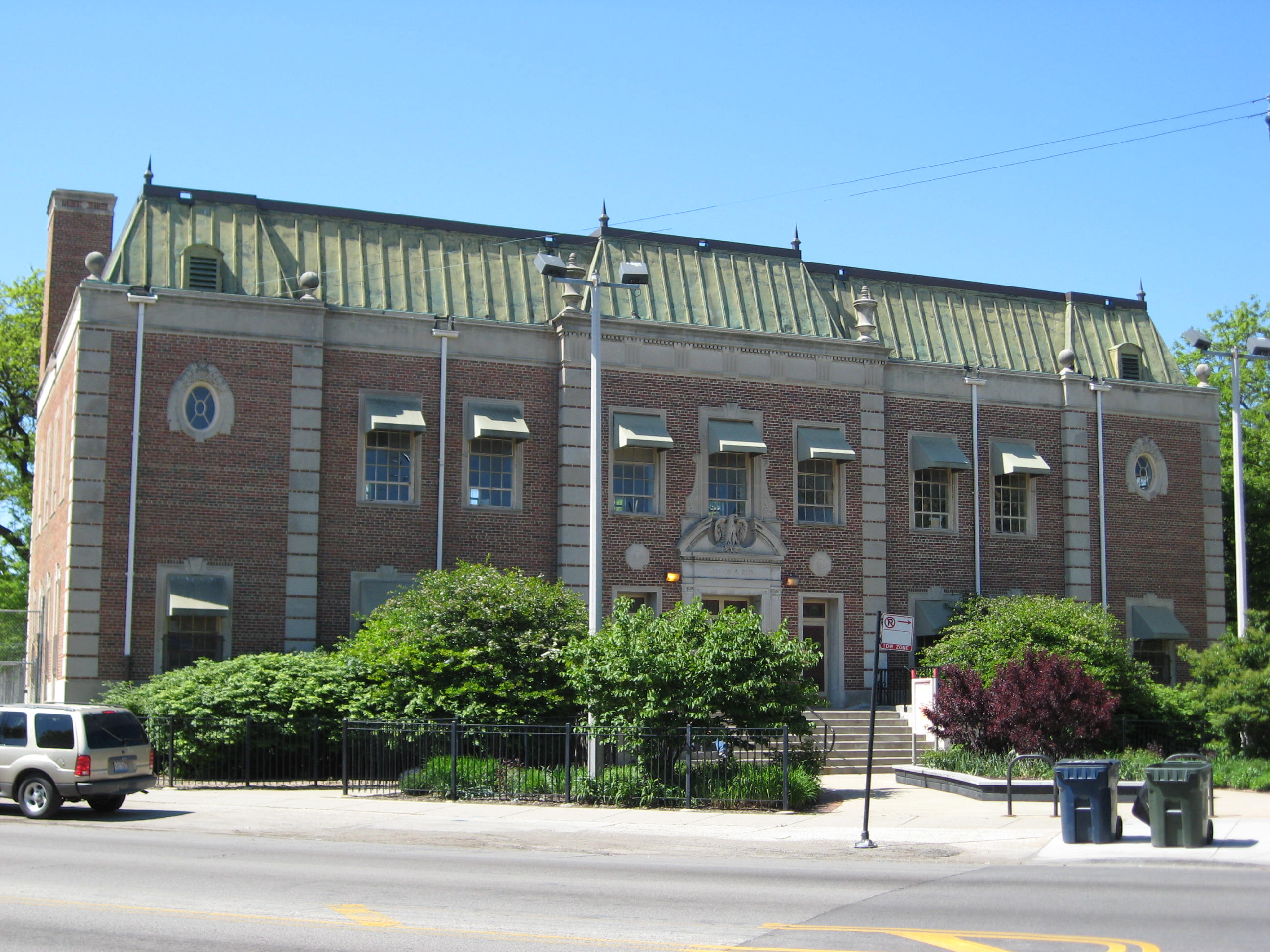 6100 W Fullerton Ave, Chicago, IL 60639